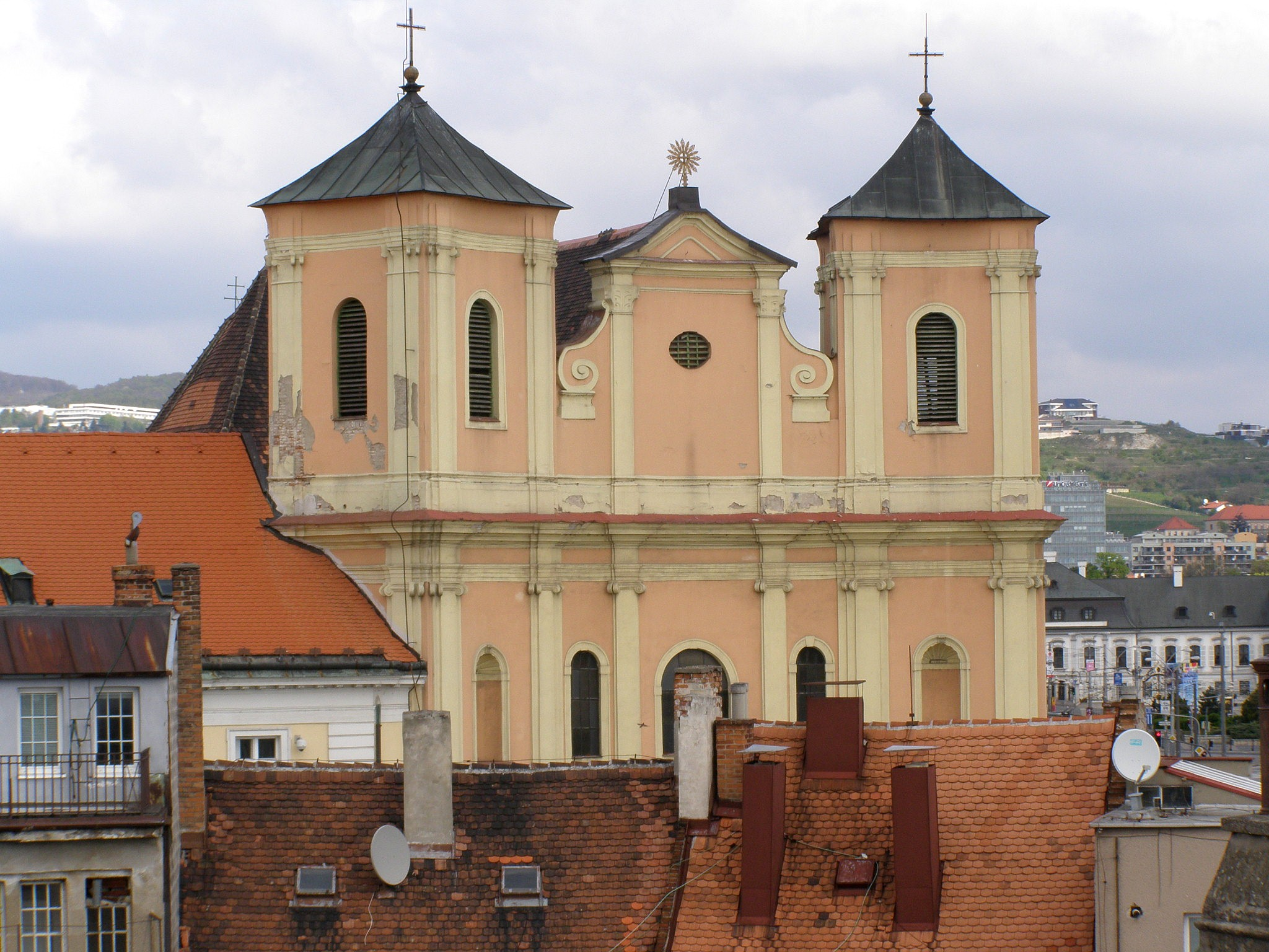 Pohľad na veže kostola z Michalskej veže